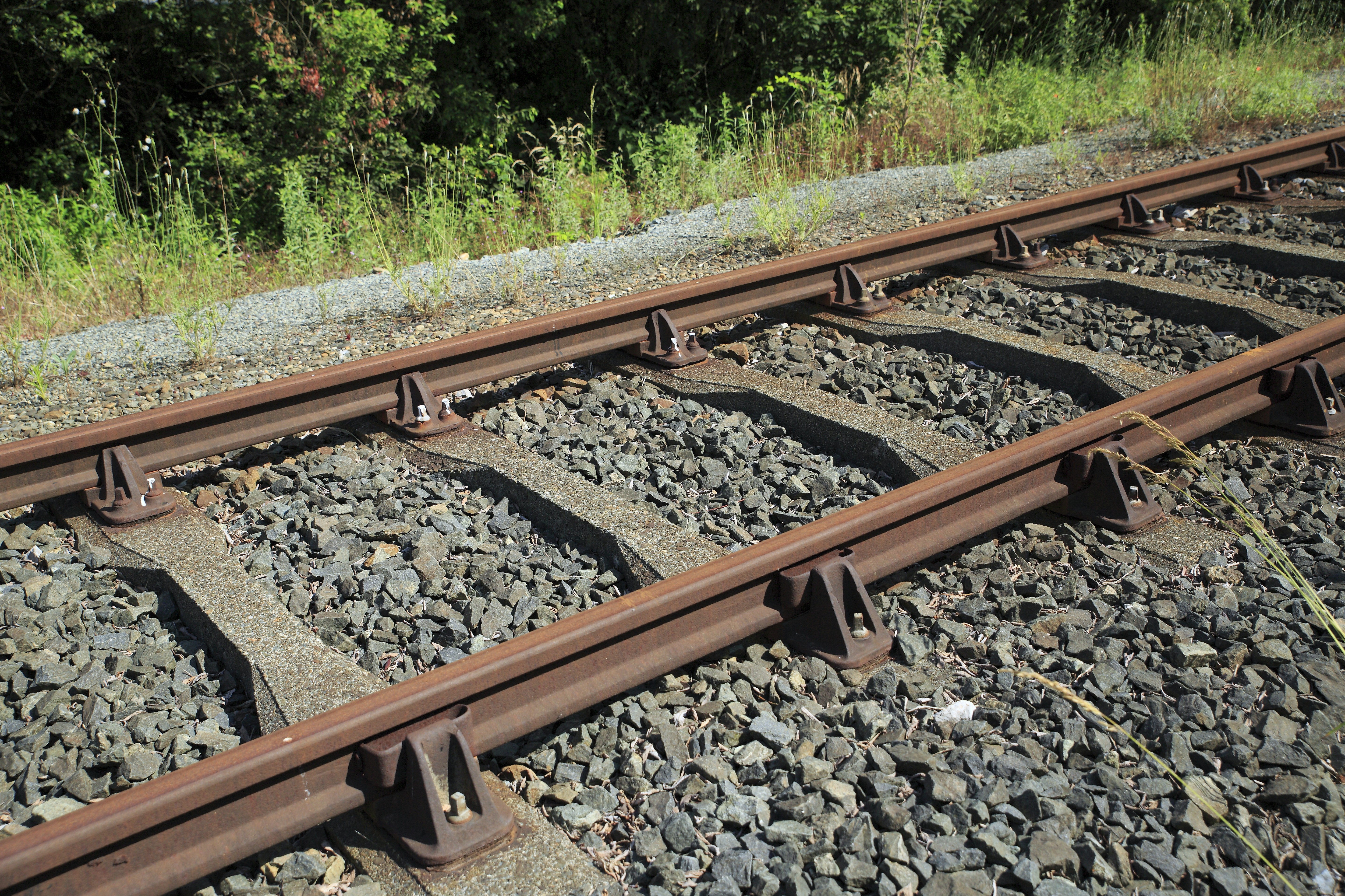 Streckengleis Lannemezan–Arreau-Cadéac hinter dem Bahnhof La Barthé-Avezac, das Gleis ist hier nur noch Ausziehgleis. Stuhlschienenoberbau mit ursprünglich wendbaren Doppelkopfschienen ist eine britische Erfindung, die jedoch auch im Frankreich weit verbreitet war. Spezielle Betonschwellen dafür waren jedoch immer selten. An Stelle der alten Holzkeile wurden recht früh Spannkeile aus Federstahl eingeführt.